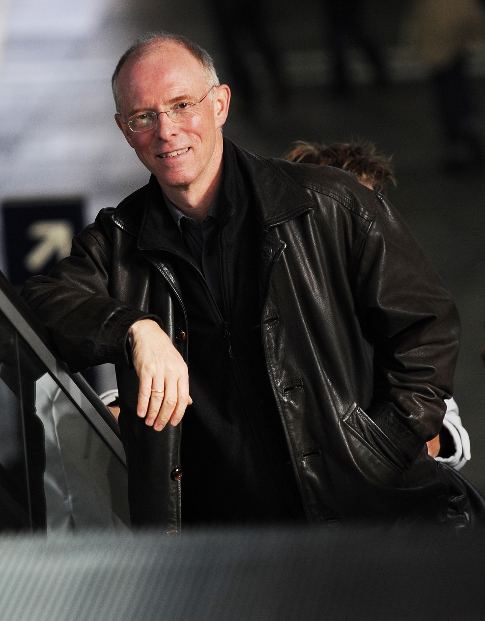 Oper- und Konzertsänger (Tenor)